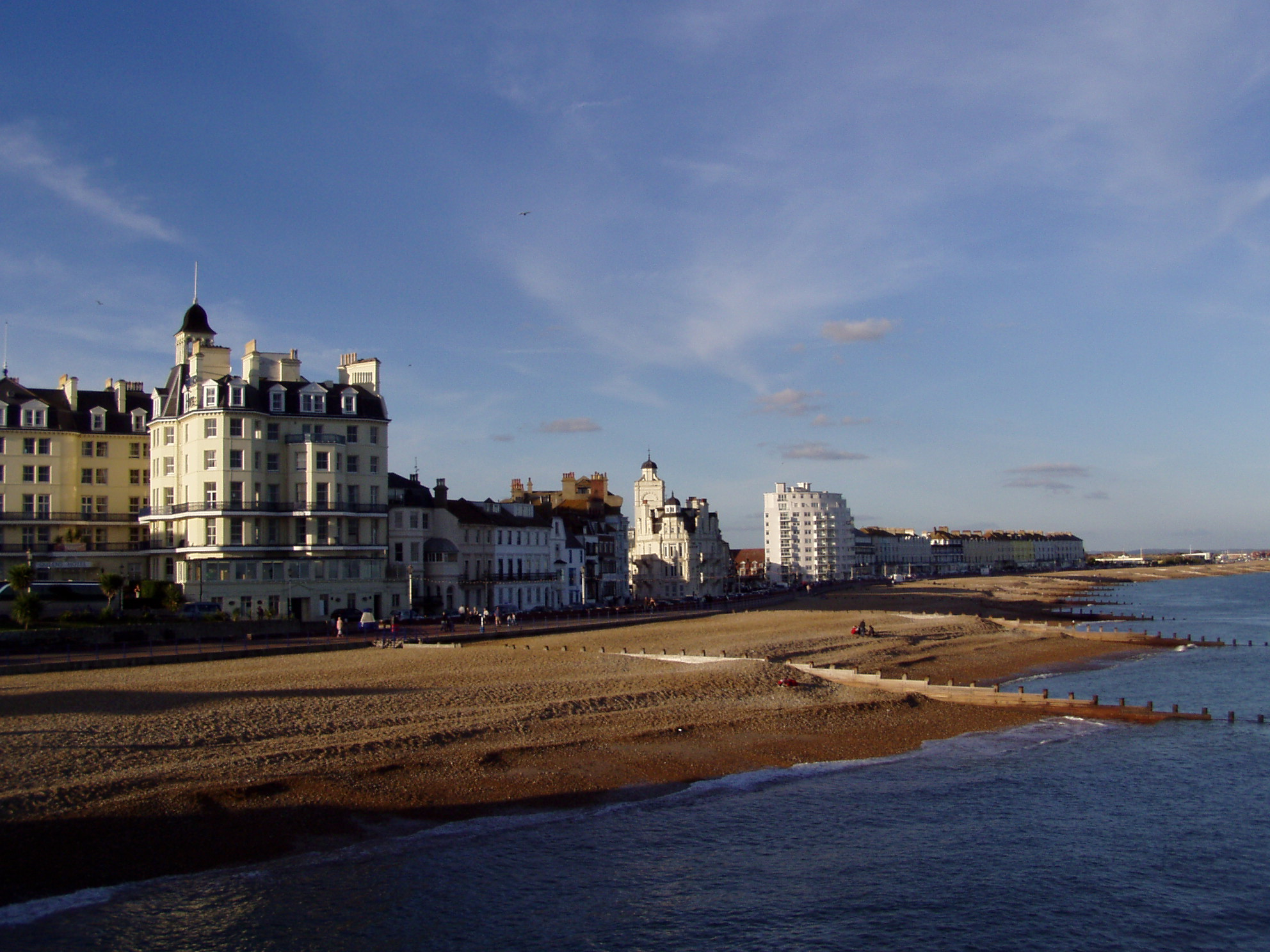 Eastbourne Seafront, von der Pier nach Osten